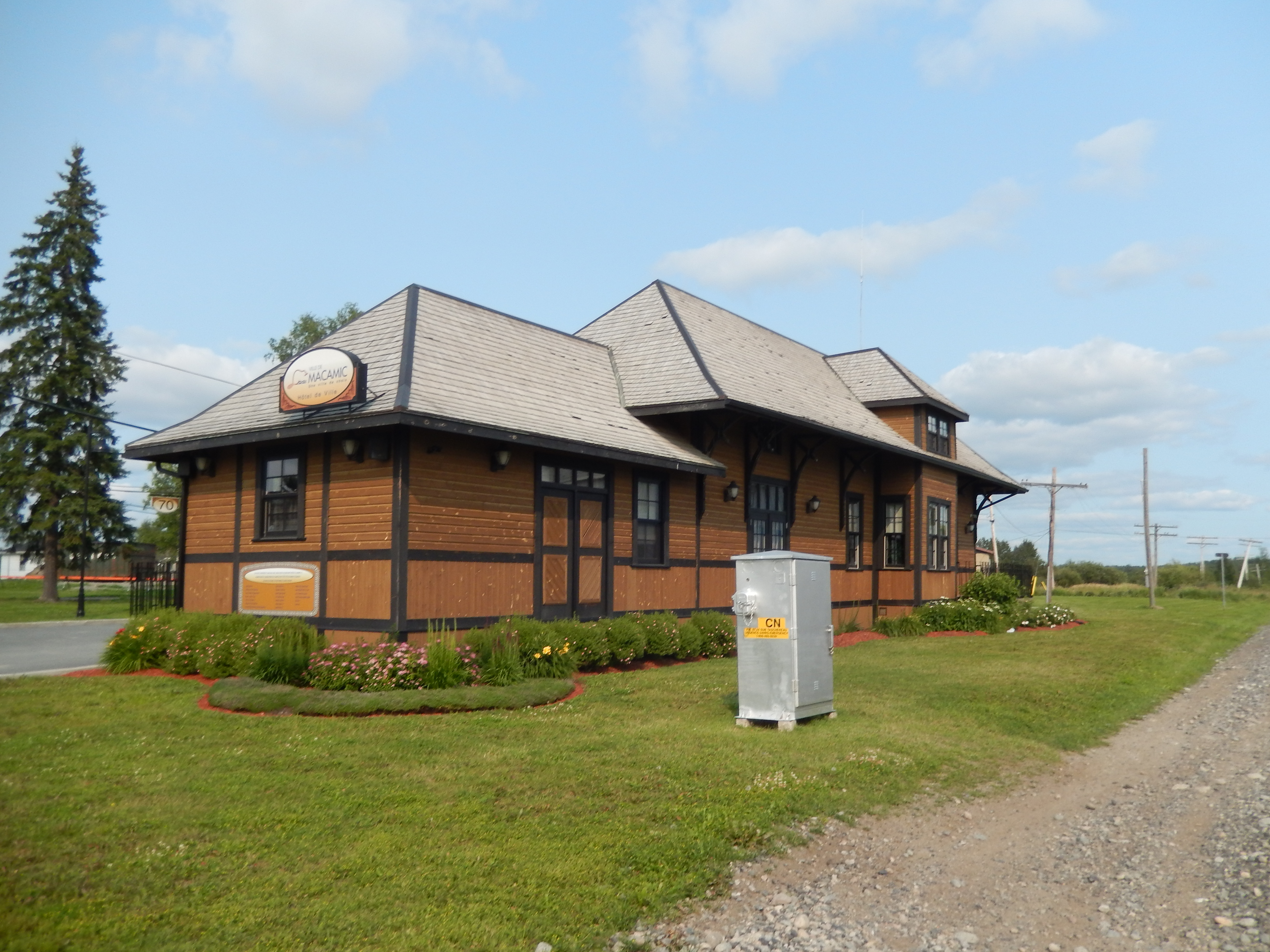 Gare de Macamic